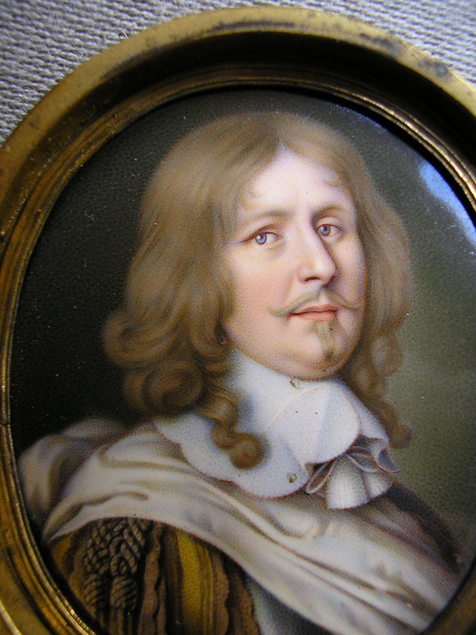 Josias de Rantzau, Maréchal de France (1609-1650). Collection particulière. Auteur de la photo: G. Curis